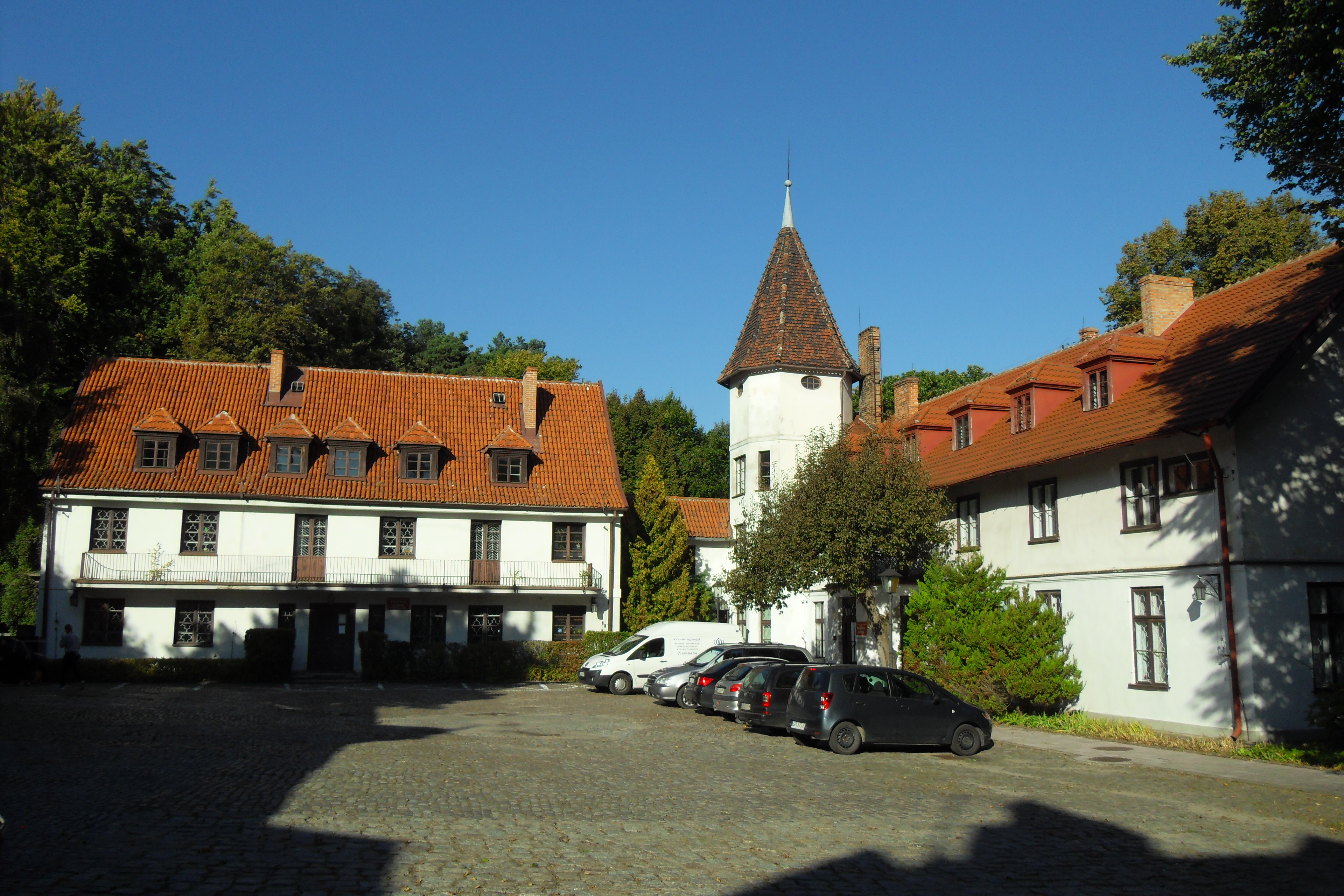 Gdańsk Oliwa, zespół dworsko-parkowy "Ludolfino", oficyna i dwór.